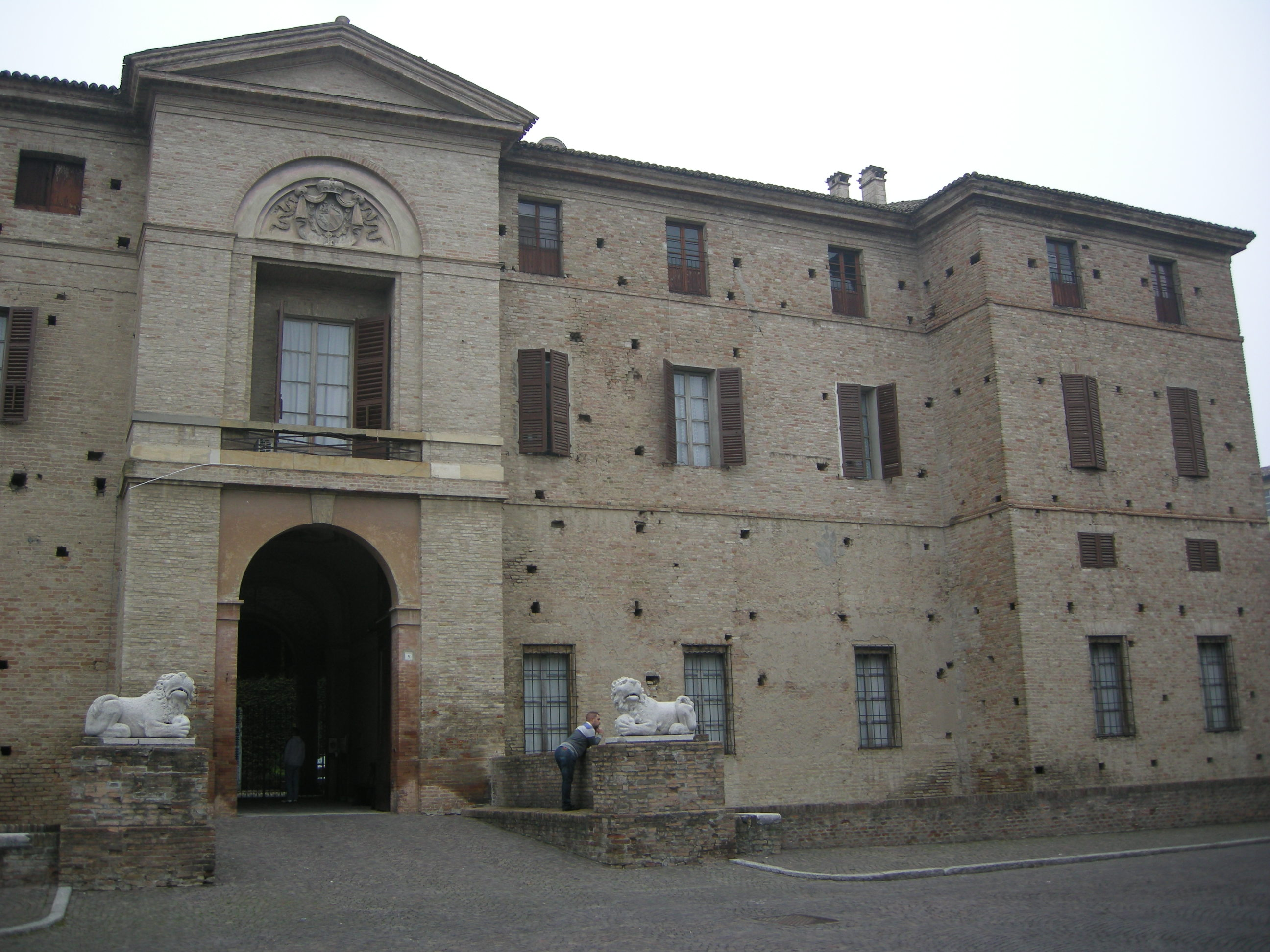 Soragna, rocca